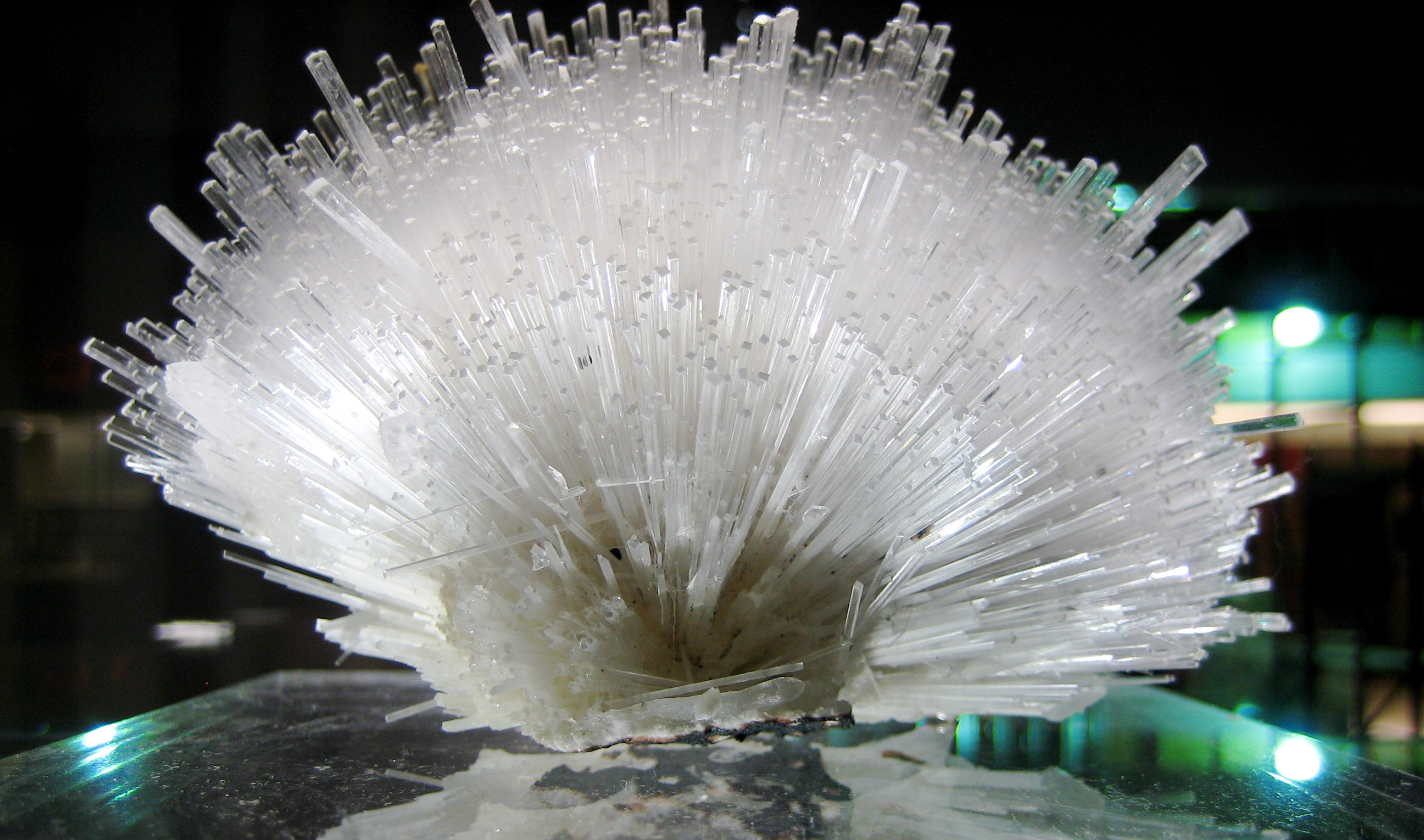 Mesolite